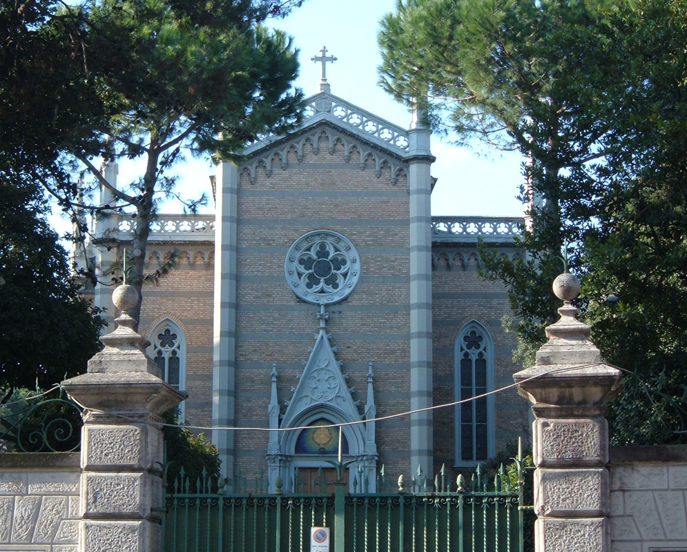 Chiesa di San Tommaso Moro, a Roma, nel quartiere Tiburtino.